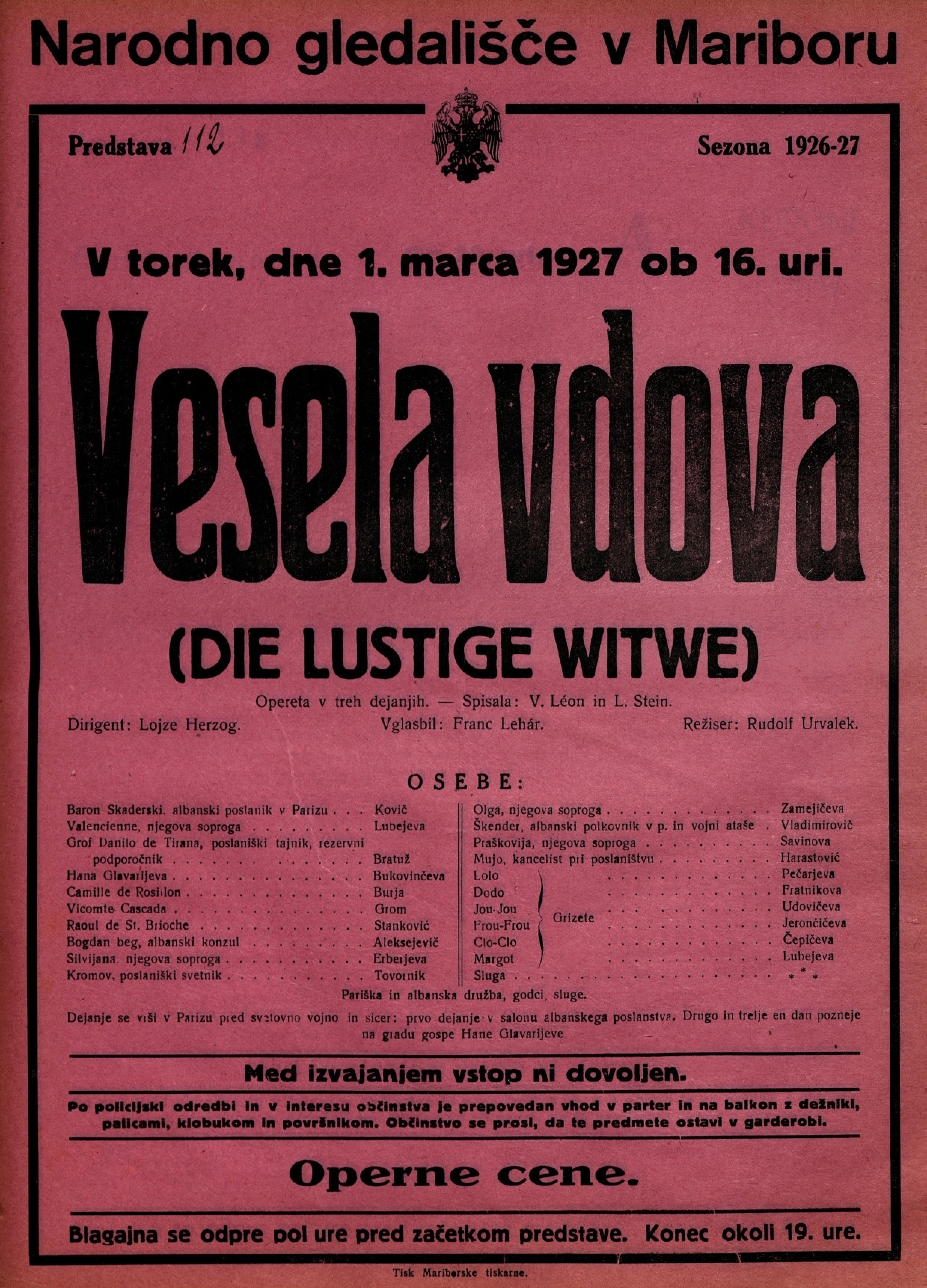 Plakat za predstavo Vesela vdova v Narodnem gledališču v Mariboru.